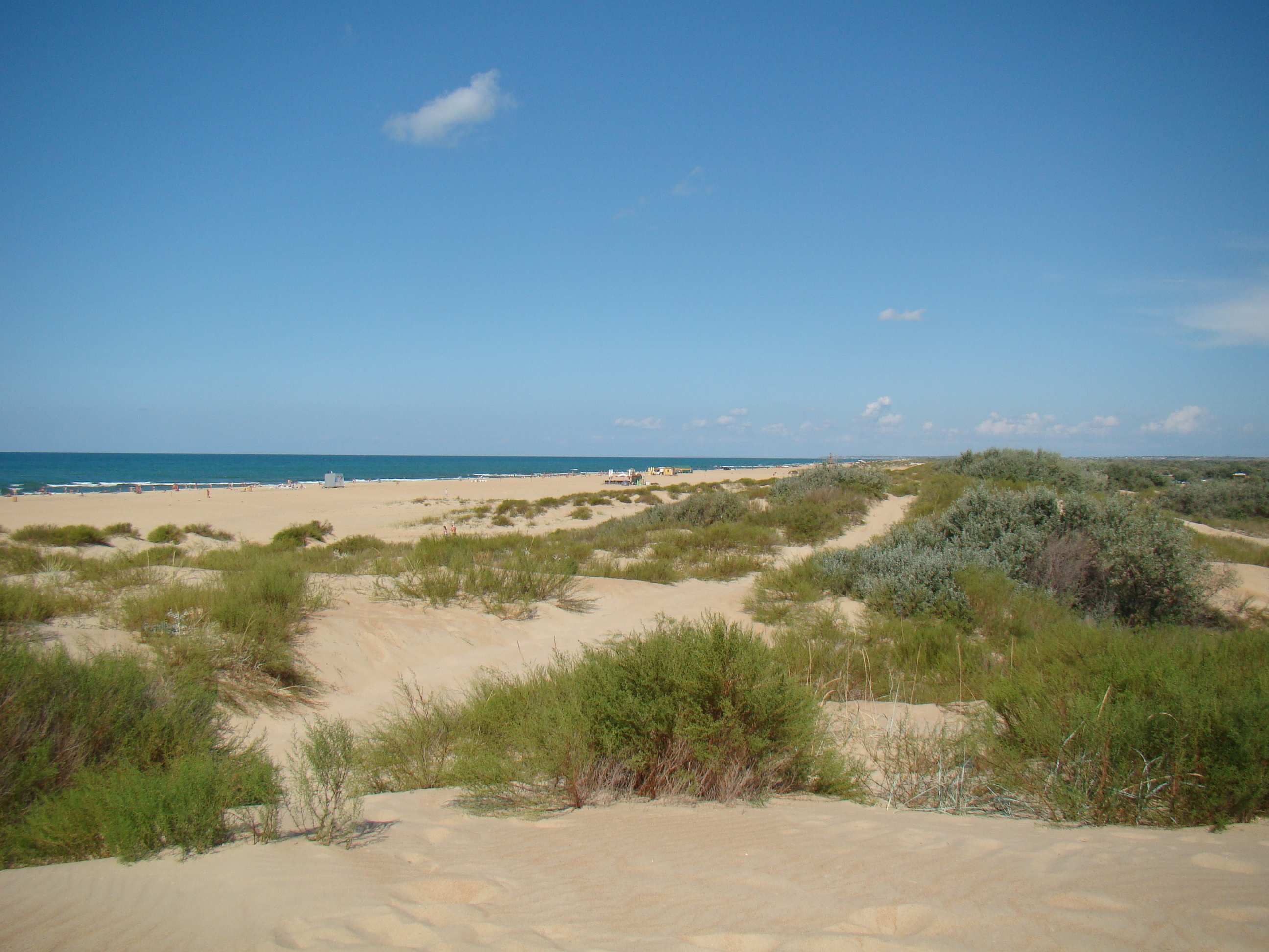 Село Витязево, муниципальное образование город-курорт Анапа, Краснодарский край, Россия. Витязевская коса (часть Анапской пересыпи). Чёрное море.